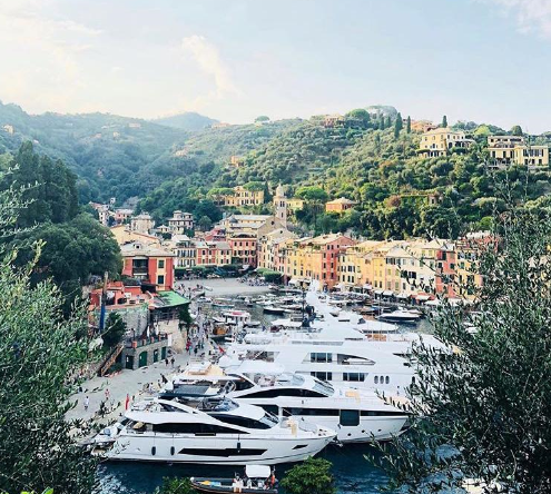 Portofino_